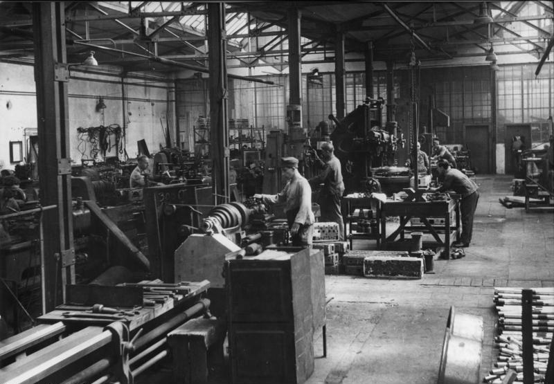 ADN-ZB/Illus-Heinscher, Ein volkseigener Betrieb arbeitet für die Landwirtschaft. Die Fahrzeugbauwerke Schönebeck/Elbe arbeiten nach ihrem Wiederaufbau landwirtschaftliche Raupenschlepper für die Landwirtschaft, die der gesamten Ostzone zugute kommen. In der Hauptsache werden Reparaturen ausgeführt. UBz: Maschinen aller Art arbeiten für die nötigen Ersatzteile. Herausgabe 28.5.1948, 1559-48